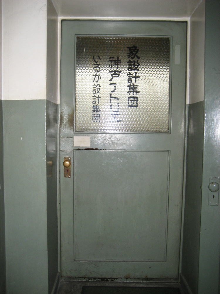 いるか設計集団